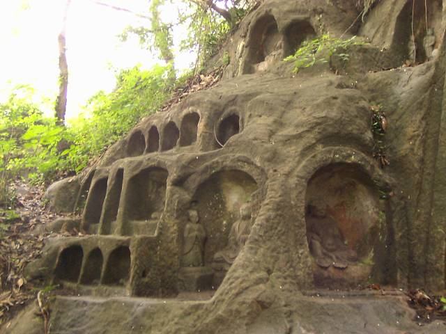 栖霞寺 千佛岩 2004年5月29日撮影 撮影者:権作 参照：